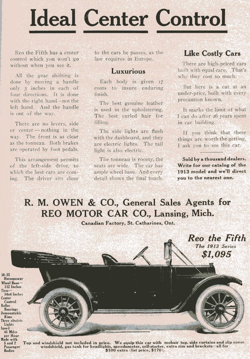 Advertisement for REO automobile, 1913